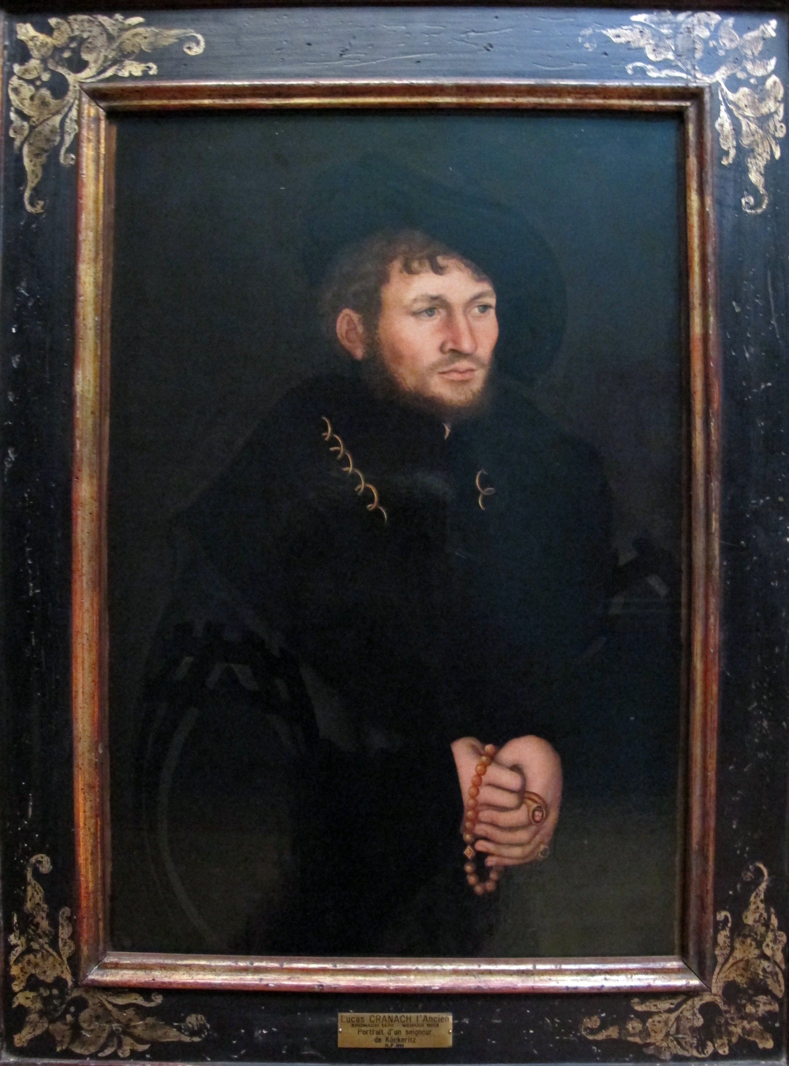 pittura tedesca al Louvre, Parigi